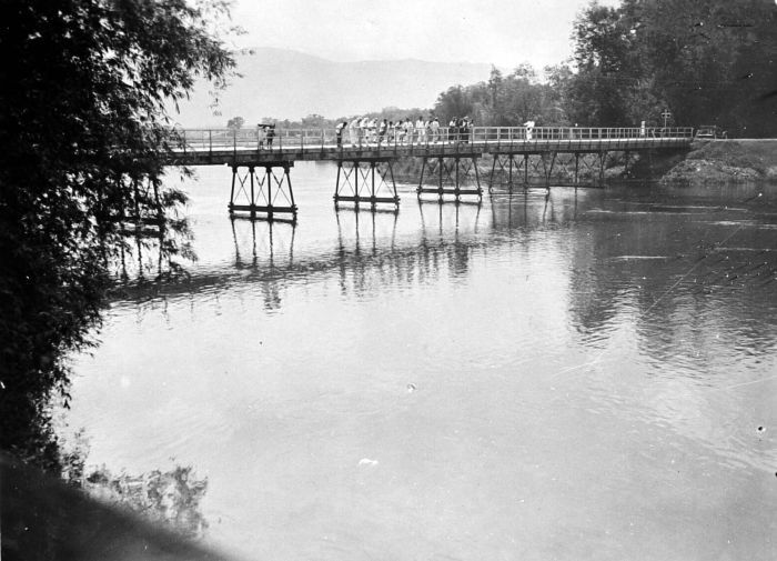 Repronegatief. De bron van de Asahanrivier bij de brug te Porsea, Sumatra